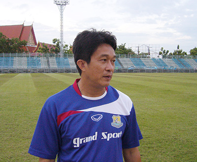 Jatuporn Pramualban